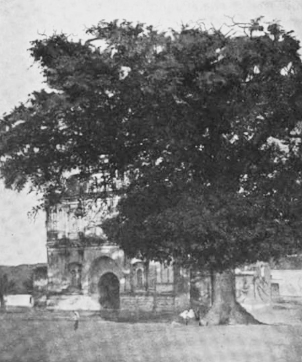 Ceiba de San Luis Jilotepeque, Guatemala. Publicada en 1897